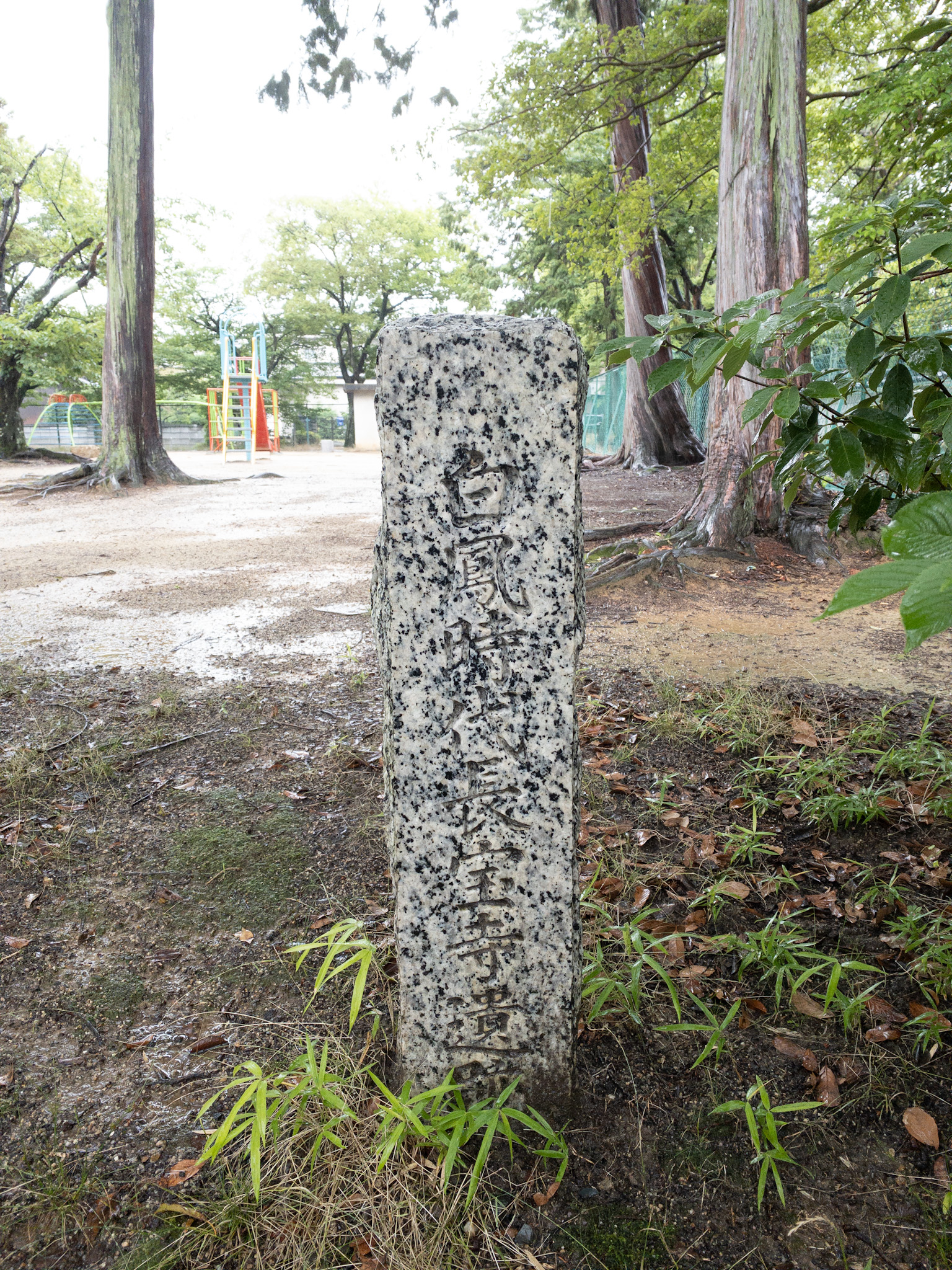 白鳳時代に存在していた長宝寺の石碑